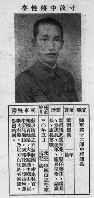 中文（台灣）: 抗戰軍人忠烈錄第一輯中的烈士遺像